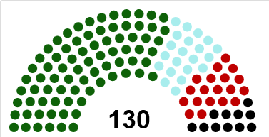 Votación del pleno del Congreso del Perú sobre la moción de la vacancia legislativa en contra de Pedro Pablo Kuczynski